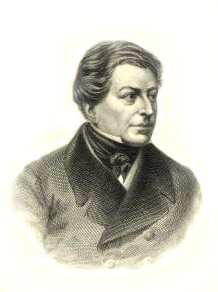 Pedro de Sousa Holstein, primeiro duque de Palmela, (1781-1850), político português.